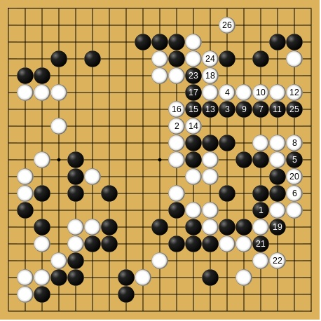 第8期本因坊戦第5局 杉内雅男-高川格(先番) 95-120手目 1954年7月5-6日